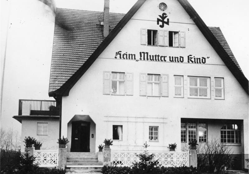 10 Jahre Hilfswerk "Mutter und Kind". Das Hilfswerk "Mutter und Kind" kann am 28. Februar [1944] auf eine 10-jährige Tätigkeit zurückblicken. Durch die NSV-Schwestern wurde tausenden deutscher Mütter überall dort nützliche Hilfe zuteil, wo es nottat. Zahlreiche Erholungsheime stehen den erholungsbedürftigen Müttern aus allen Bevölkerungsschichten zur Verfügung. Vorbildliche Erholungsstätten und Heime für Mütter wurden in allen Gauen des Reiches geschaffen. 640 a E.M. Orbis